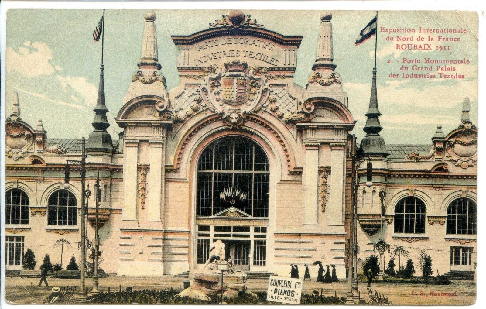 Porte monumentale du grand palais des industries textiles de l'exposition internationale du Nord à Roubaix en 1911. Carte postale ancienne.